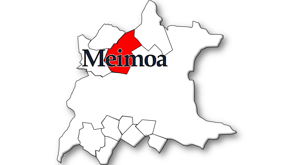 População